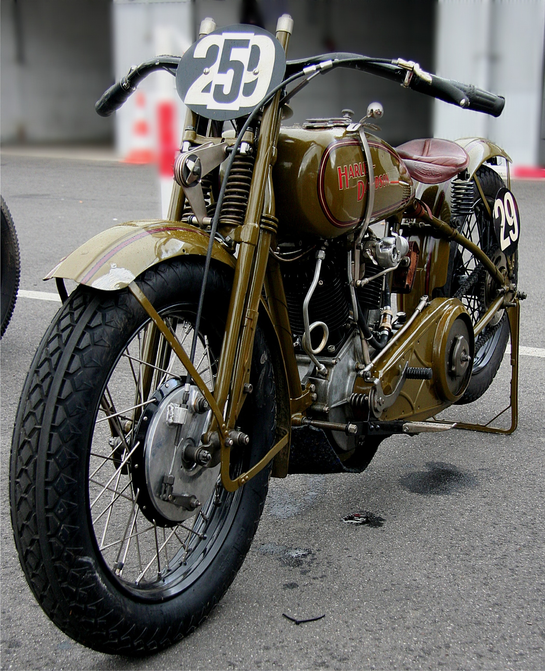 Harley-Davidson JDL-Racer, Baujahr 1929, 1200 cm³, Handschaltung links, darunter Fußkupplung, links am Lenker Handbremshebel. 16.06.2007 beim Oldtimer-Festival im Fahrerlager des Nürburgrings